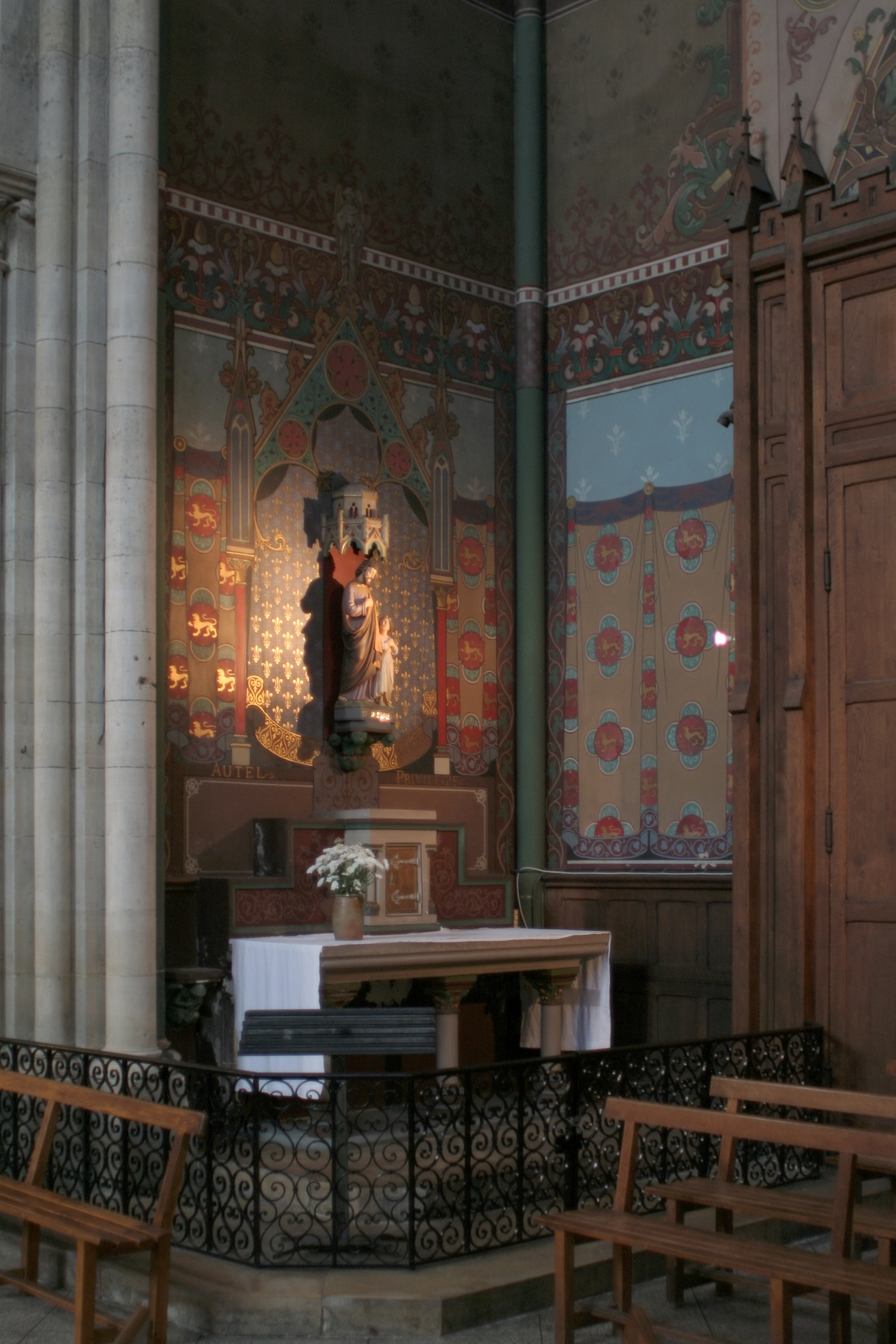 Église Saint-Jean-Baptiste de Belleville, Paris 19e arrondissement. Autel de saint-Joseph.